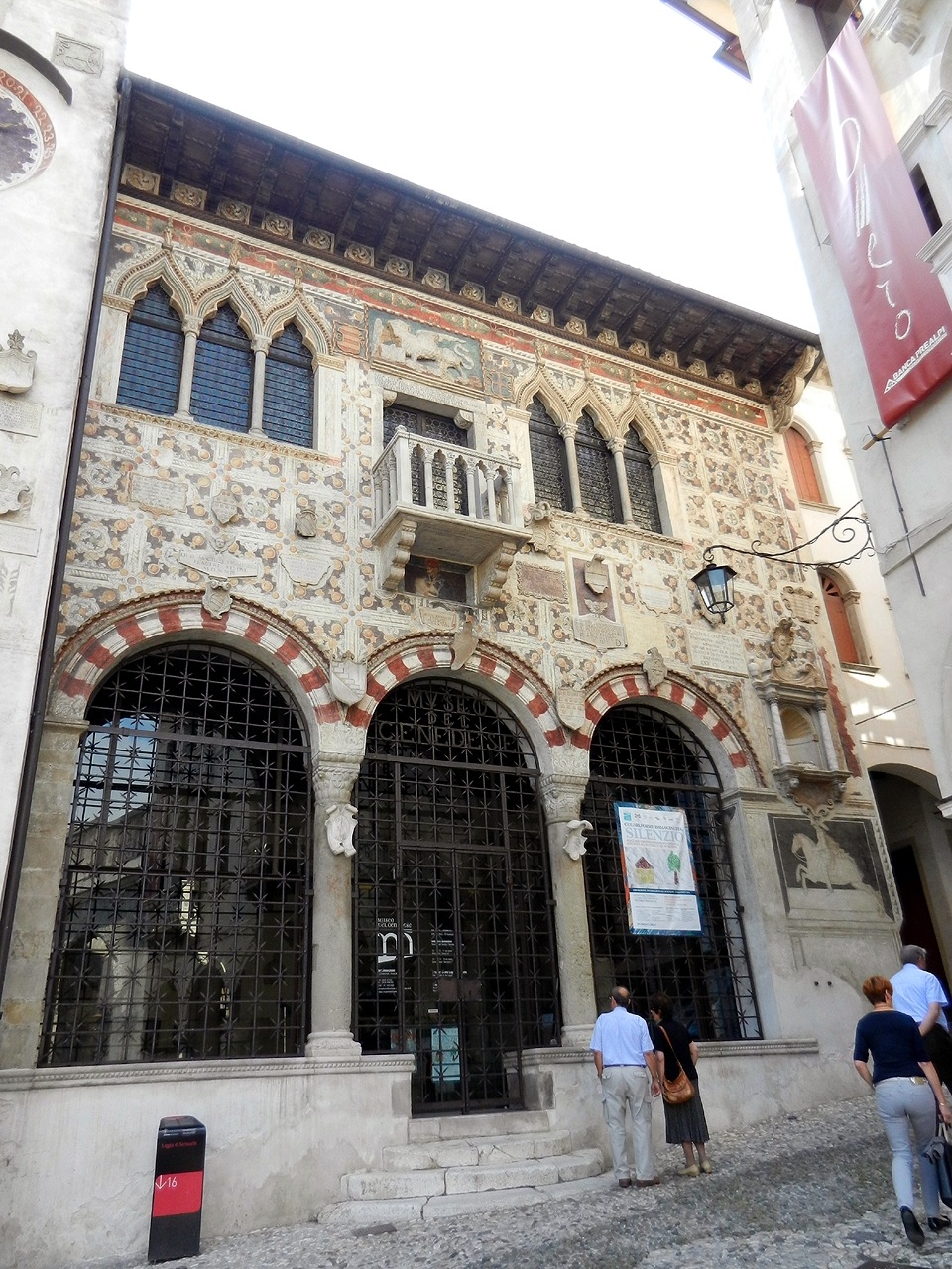 Vittorio Veneto - Loggia di Serravalle (Palazzo della Comunità)